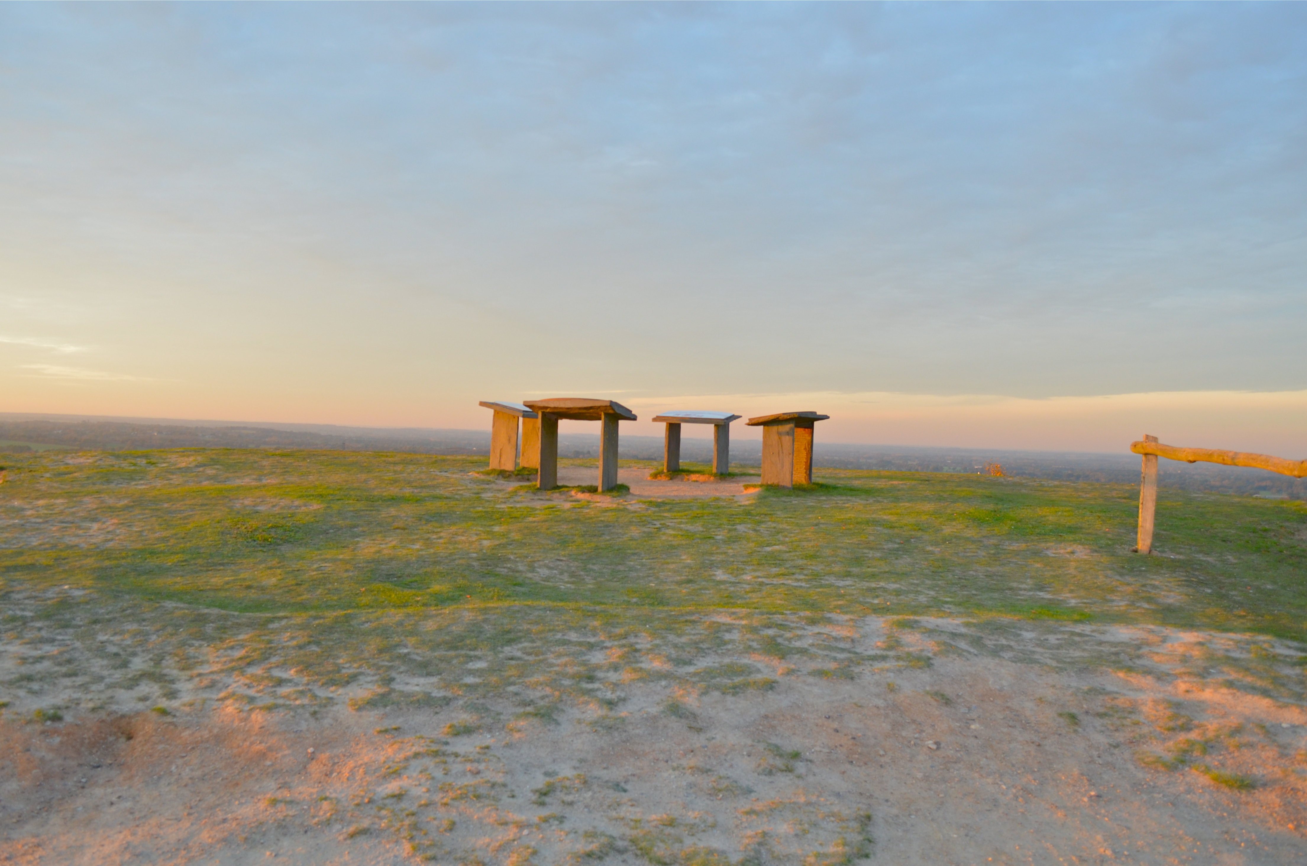 Sommet du terril de l'ancienne mine - Abbaretz (Loire-Atlantique)